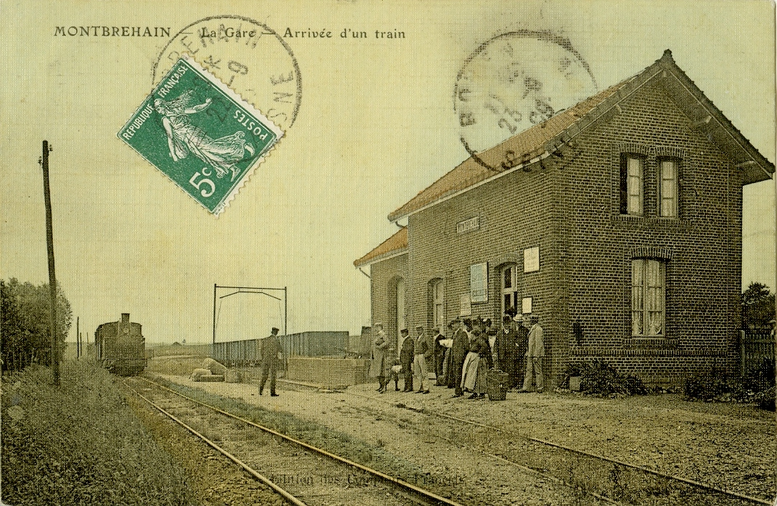 La gare de Montbrehain en 1910.